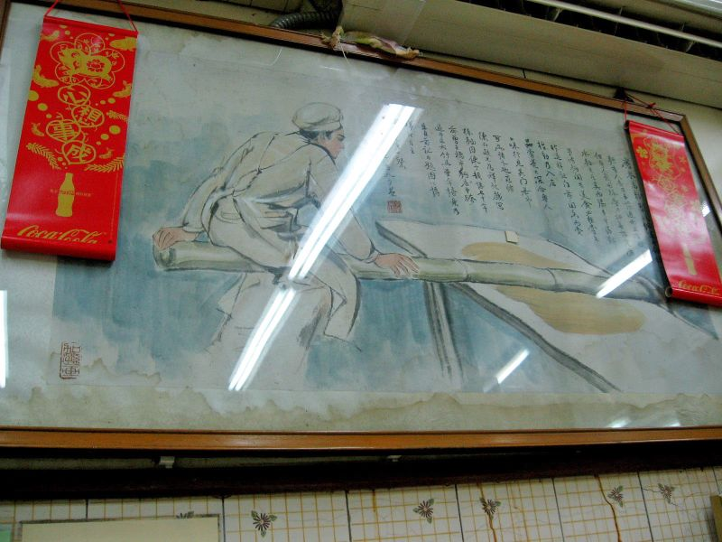 Traditional making of Jook-sing noodles (竹昇麵).